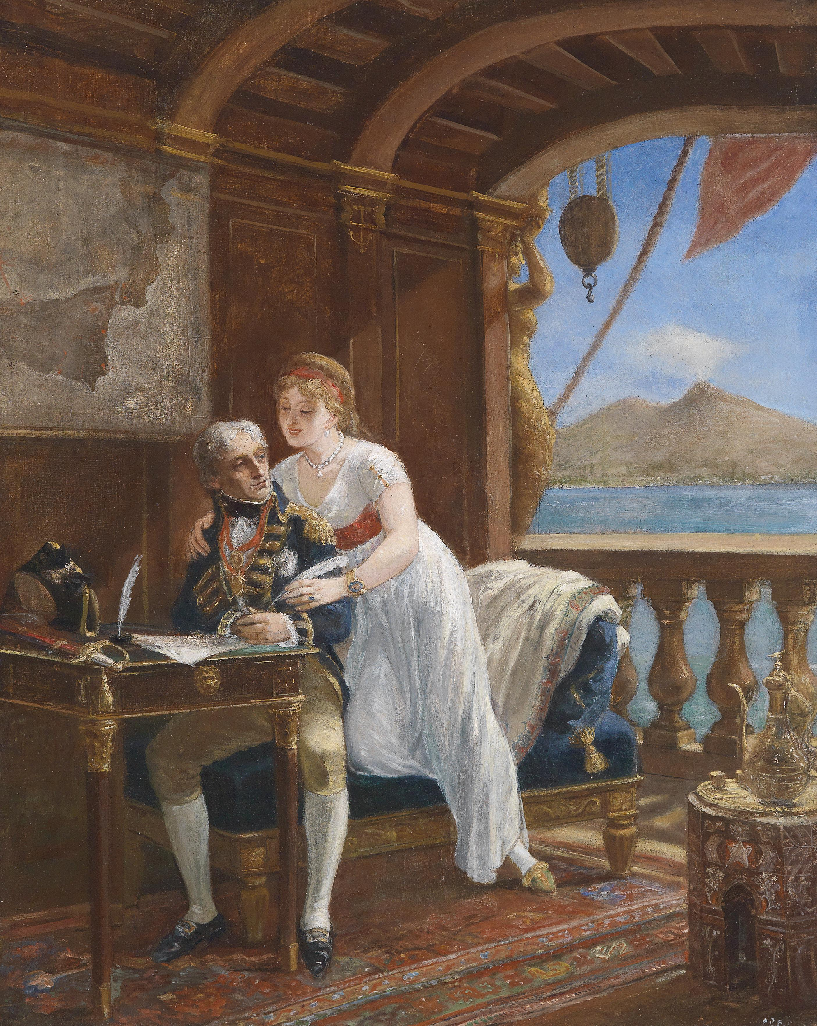 Admiral Nelson und Lady Hamilton in Neapeltitle QS:P1476,de:"Admiral Nelson und Lady Hamilton in Neapel" label QS:Lde,"Admiral Nelson und Lady Hamilton in Neapel"